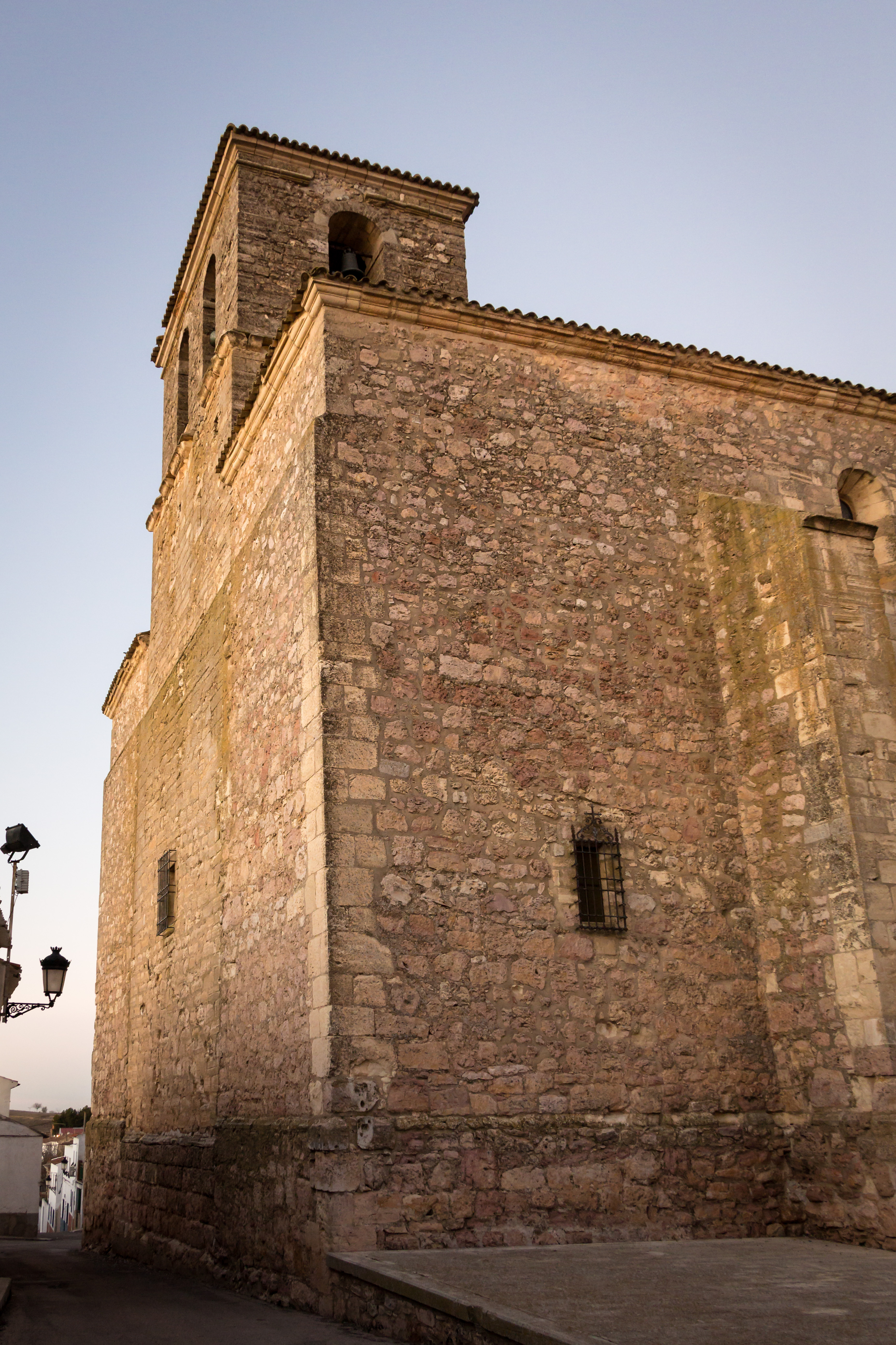 Iglesia de San Pedro Apóstol Esquina Exterior